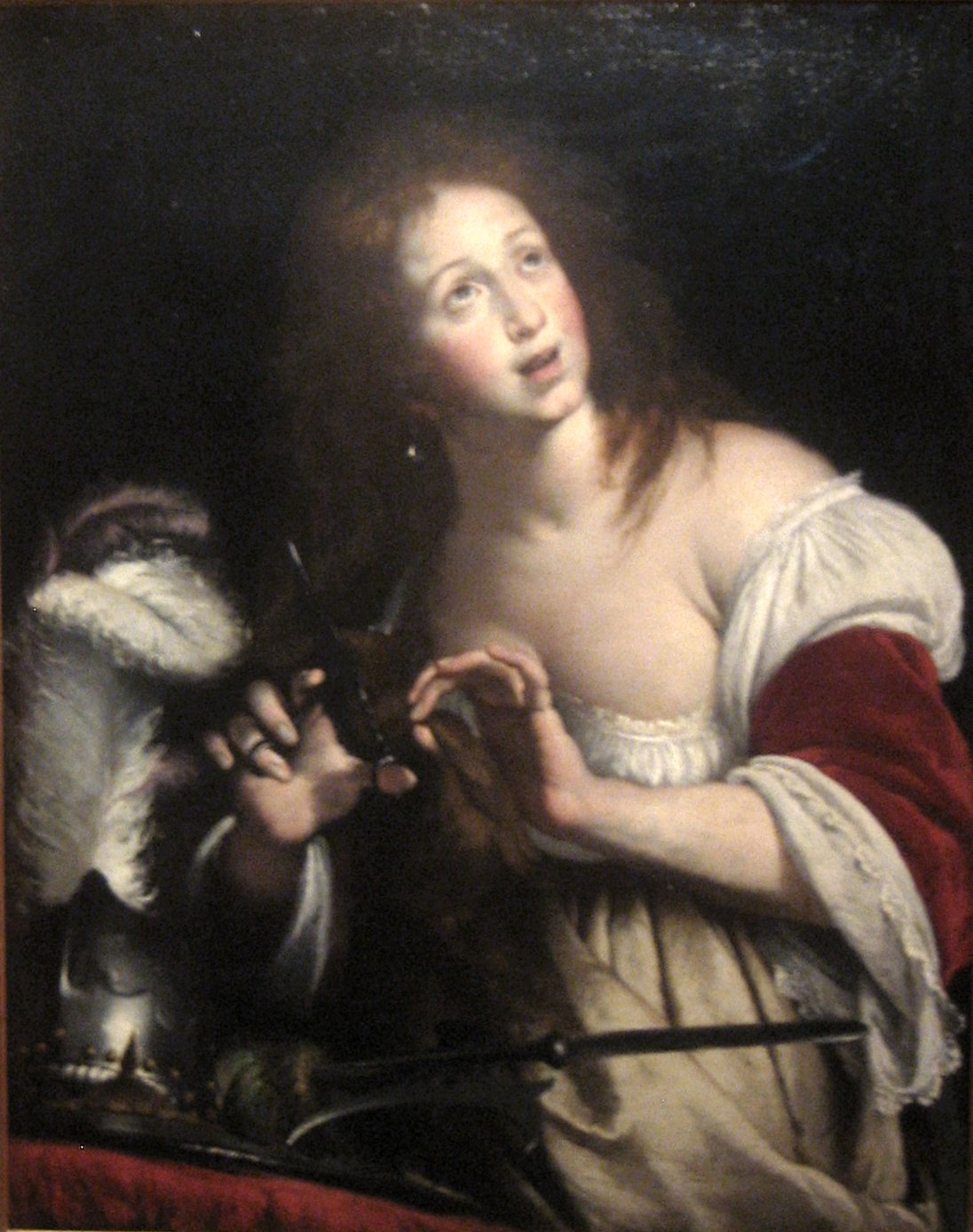 Berenice